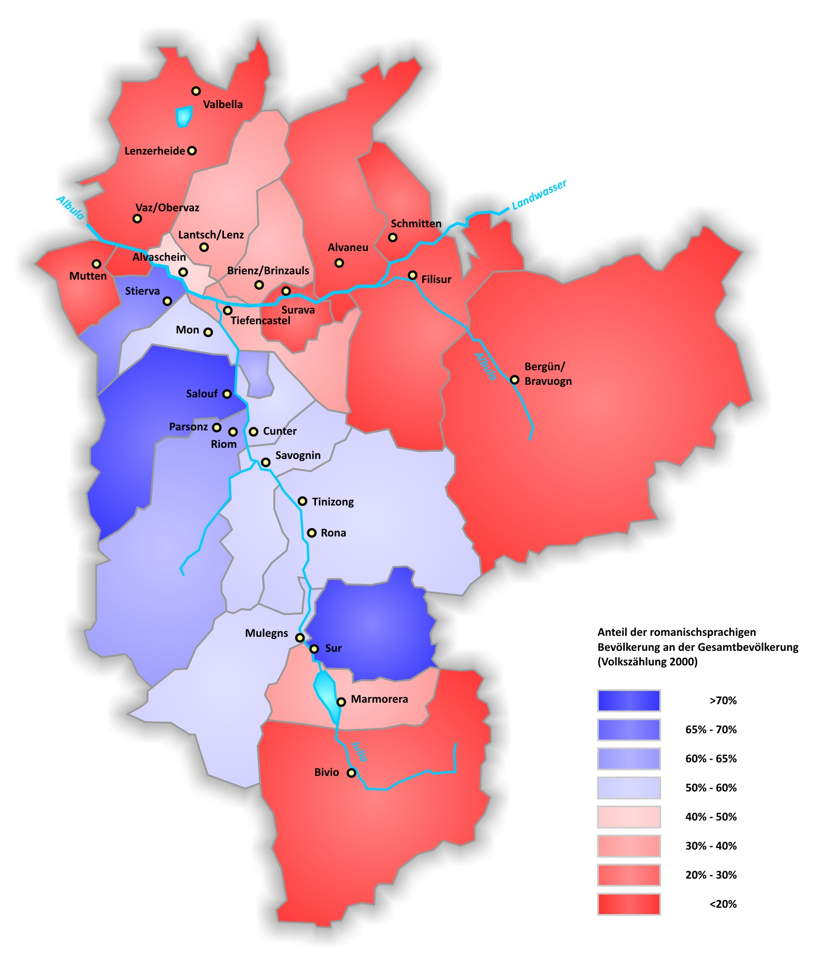 Übersicht des surmiranen Sprachgebiets Rumantsch: Survista digl territori linguistic surmiran